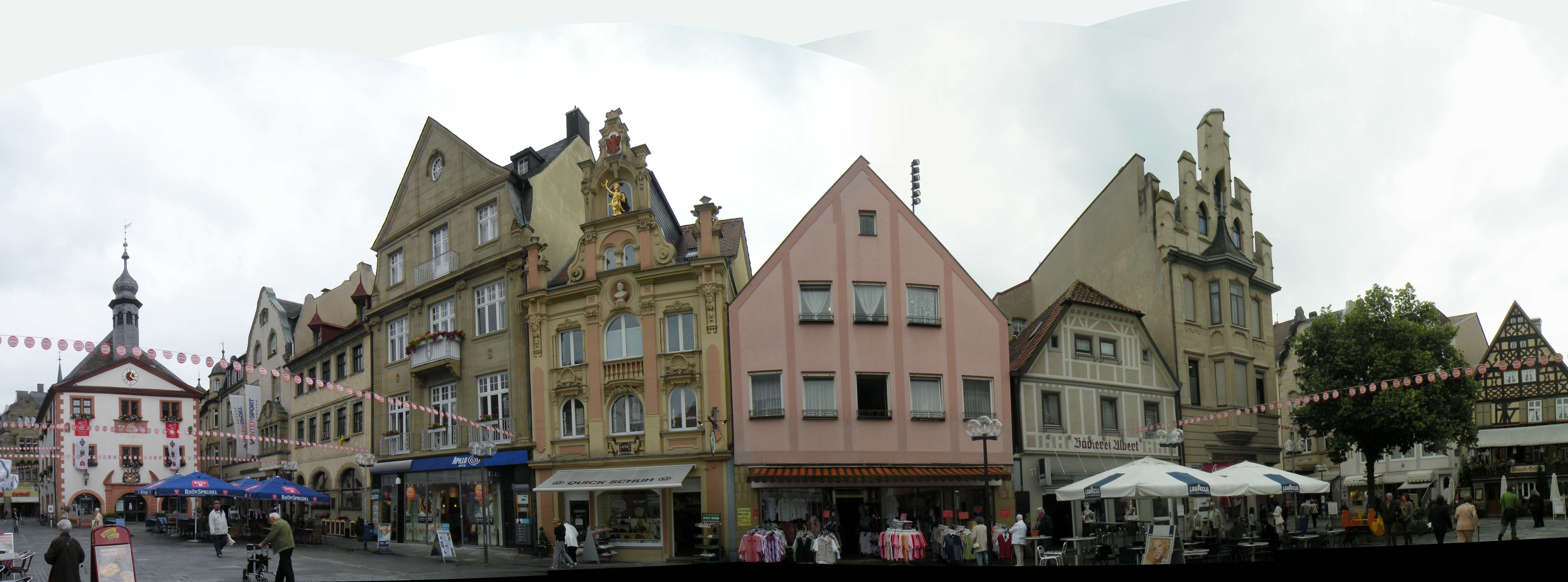 Marktplatz in Bad Kissingen (links) mit Unterer Marktstraße (rechts)